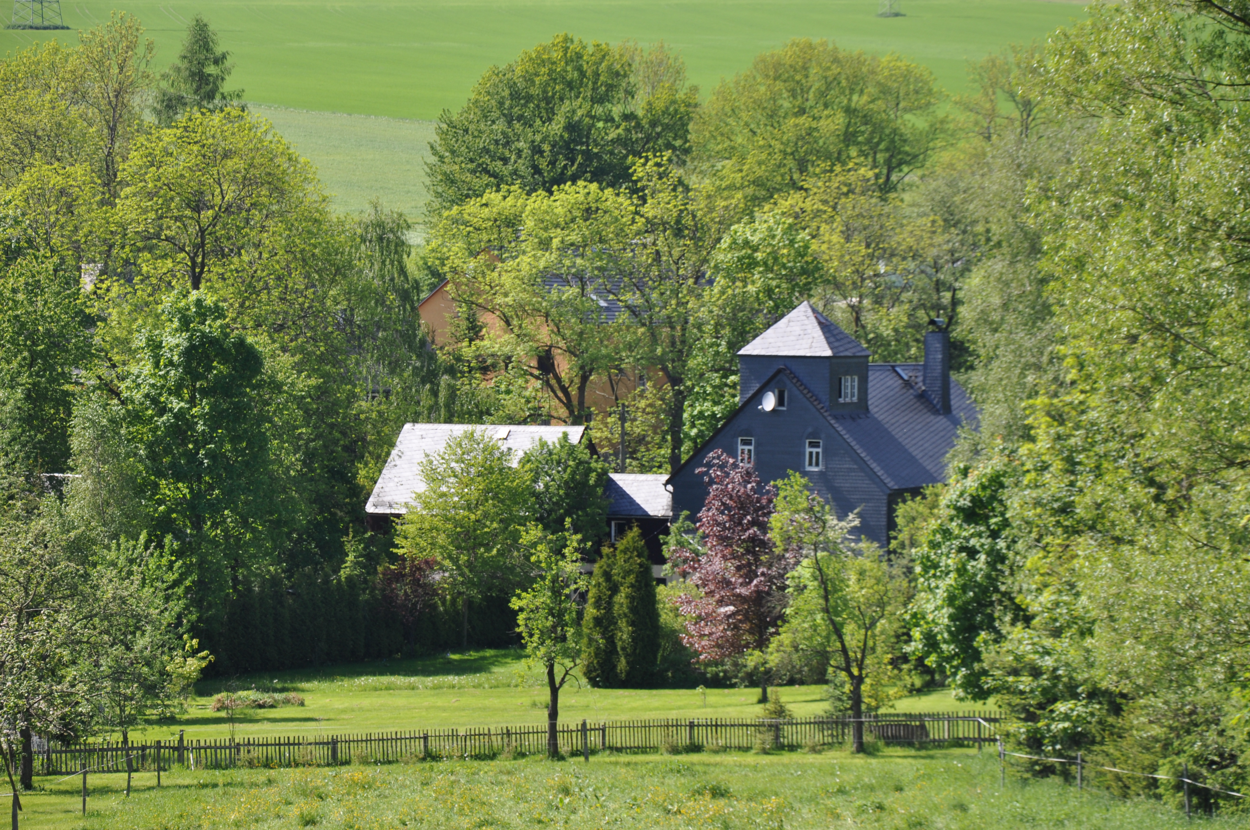 Mühle und Bäckerei Doehring